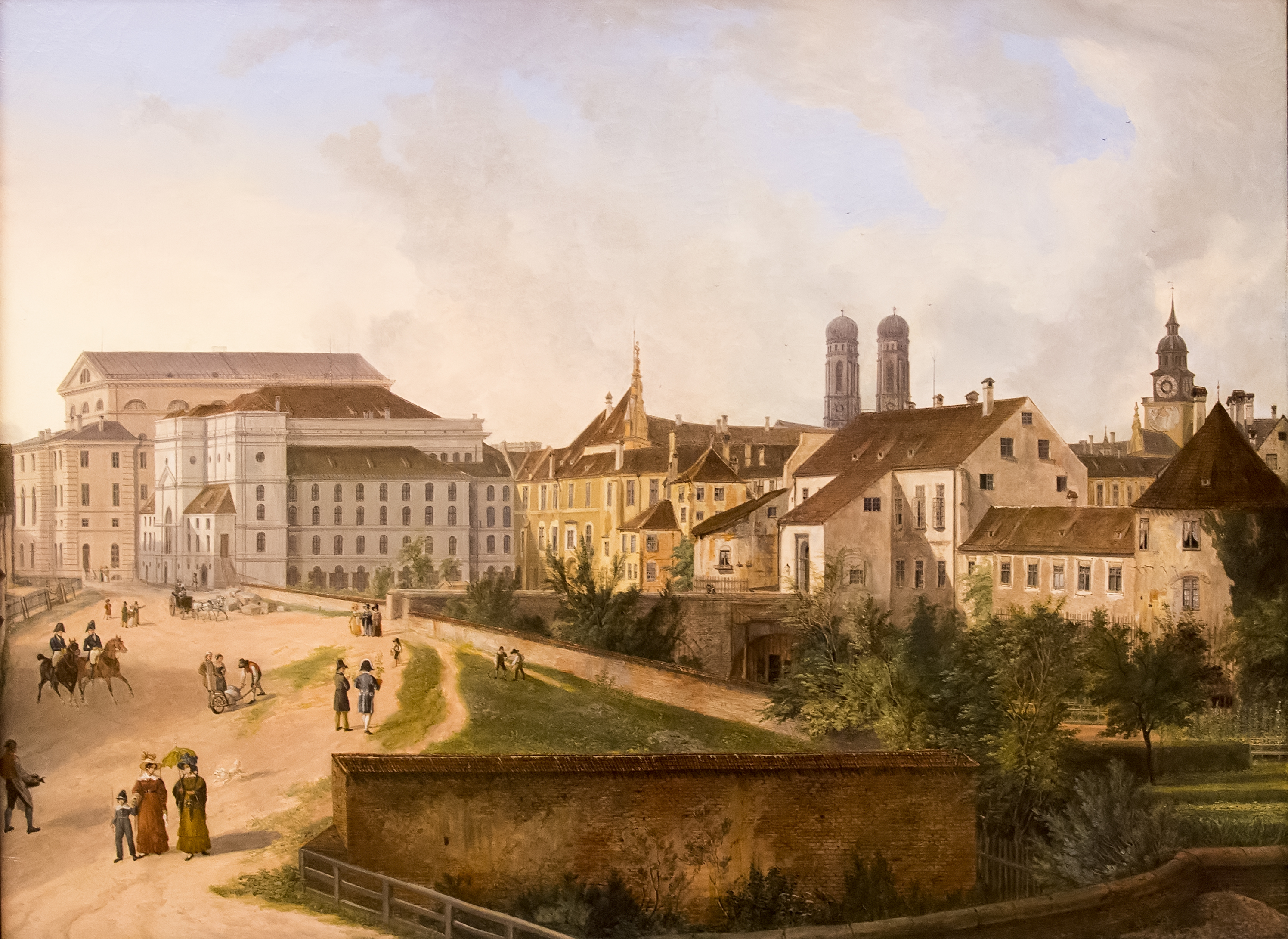 Domenico Quaglio (1787-1837) De Residentie (Residenz) vanaf het noordoosten (1827) Neue Pinakothek